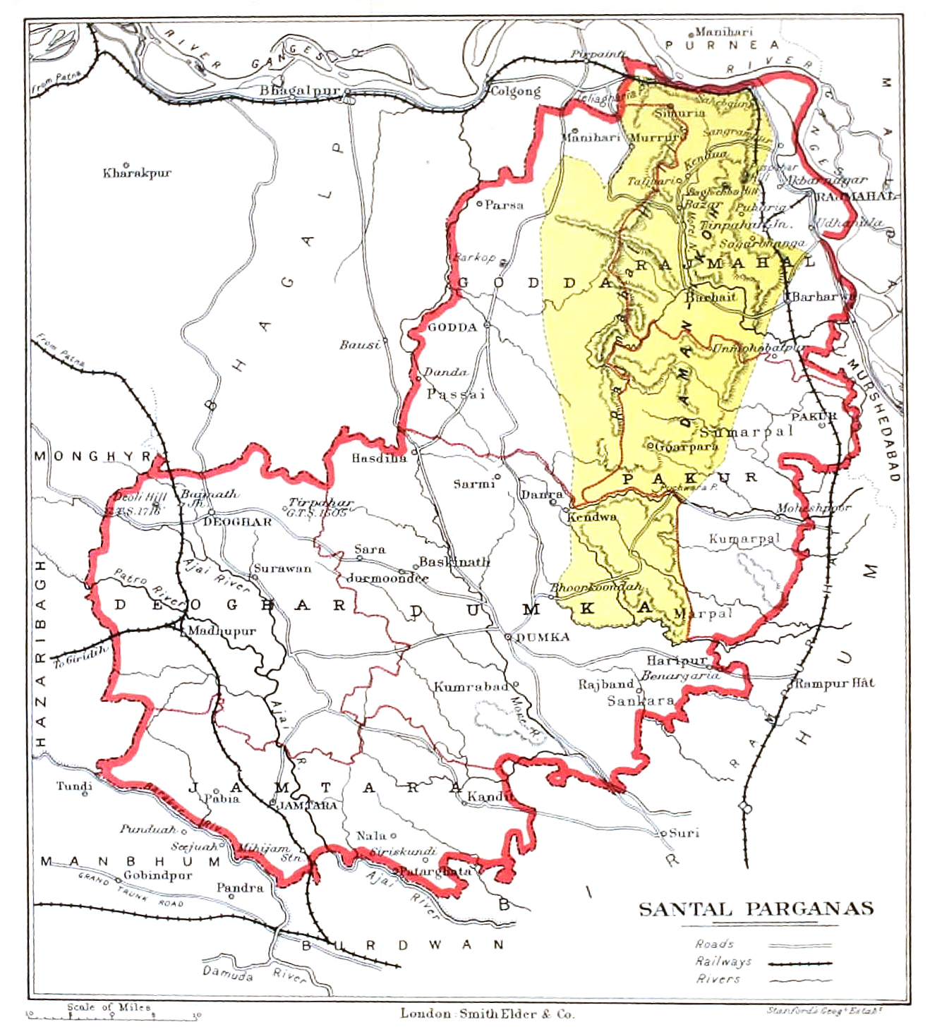 Map of Santal Parganas